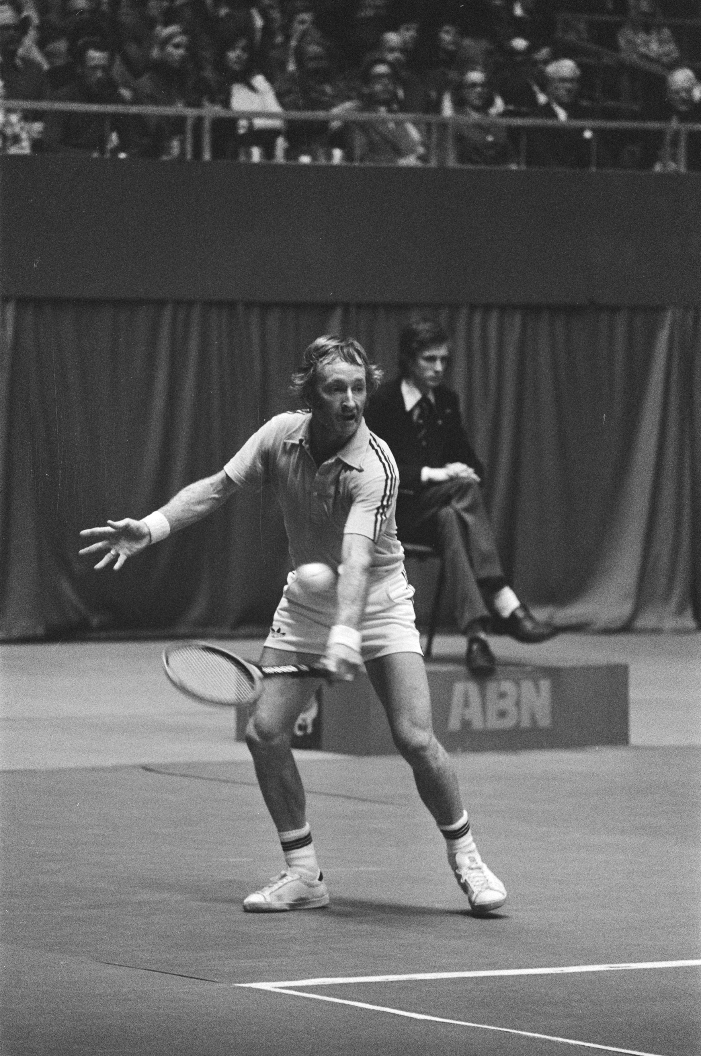 Collectie / Archief : Fotocollectie Anefo Reportage / Serie : [ onbekend ] Beschrijving : ABN Wereldtennis in Ahoy Rotterdam; Laver in aktie Datum : 24 februari 1976 Locatie : Rotterdam, Zuid-Holland Trefwoorden : tennis Instellingsnaam : ABN, Ahoy Fotograaf : Bogaerts, Rob / Anefo Auteursrechthebbende : Nationaal Archief Materiaalsoort : Negatief (zwart/wit) Nummer archiefinventaris : bekijk toegang 2.24.01.05 Bestanddeelnummer : 928-4300